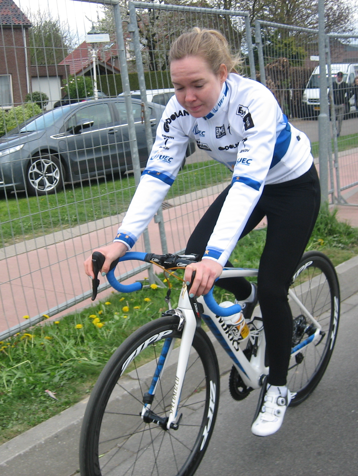 Winnares Anna van der Breggen, na de finish van de Amstel Gold Race Ladies Edition 2017.